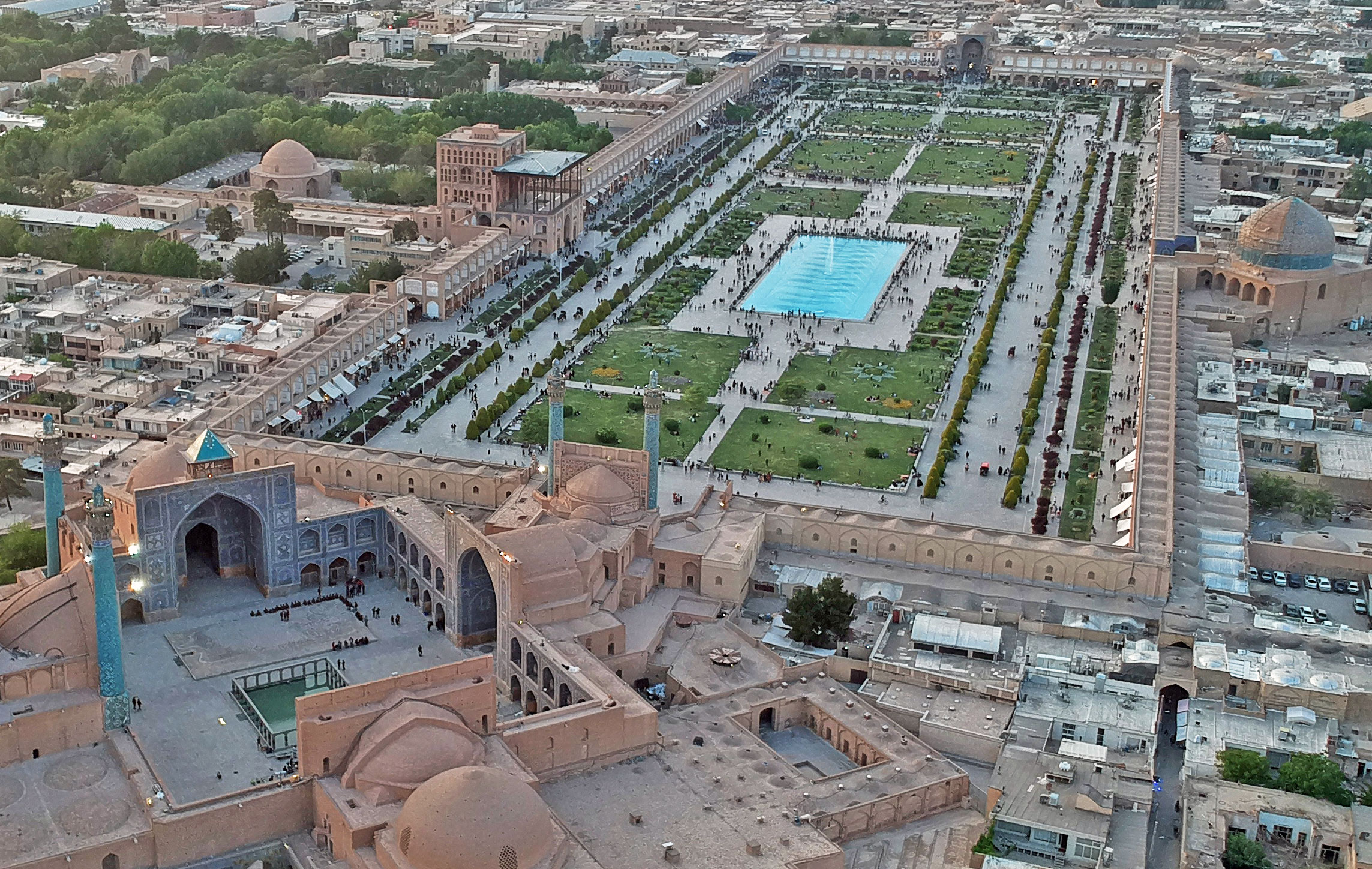 میدان شاه/ امام خمینی/ نقش جهان